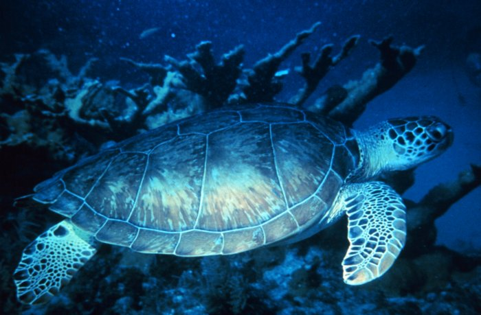 Suppenschildkröte (Chelonia mydas)